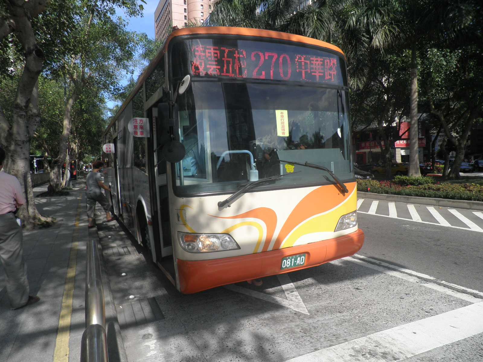 大都會客運081-AD行駛臺北市聯營公車270線